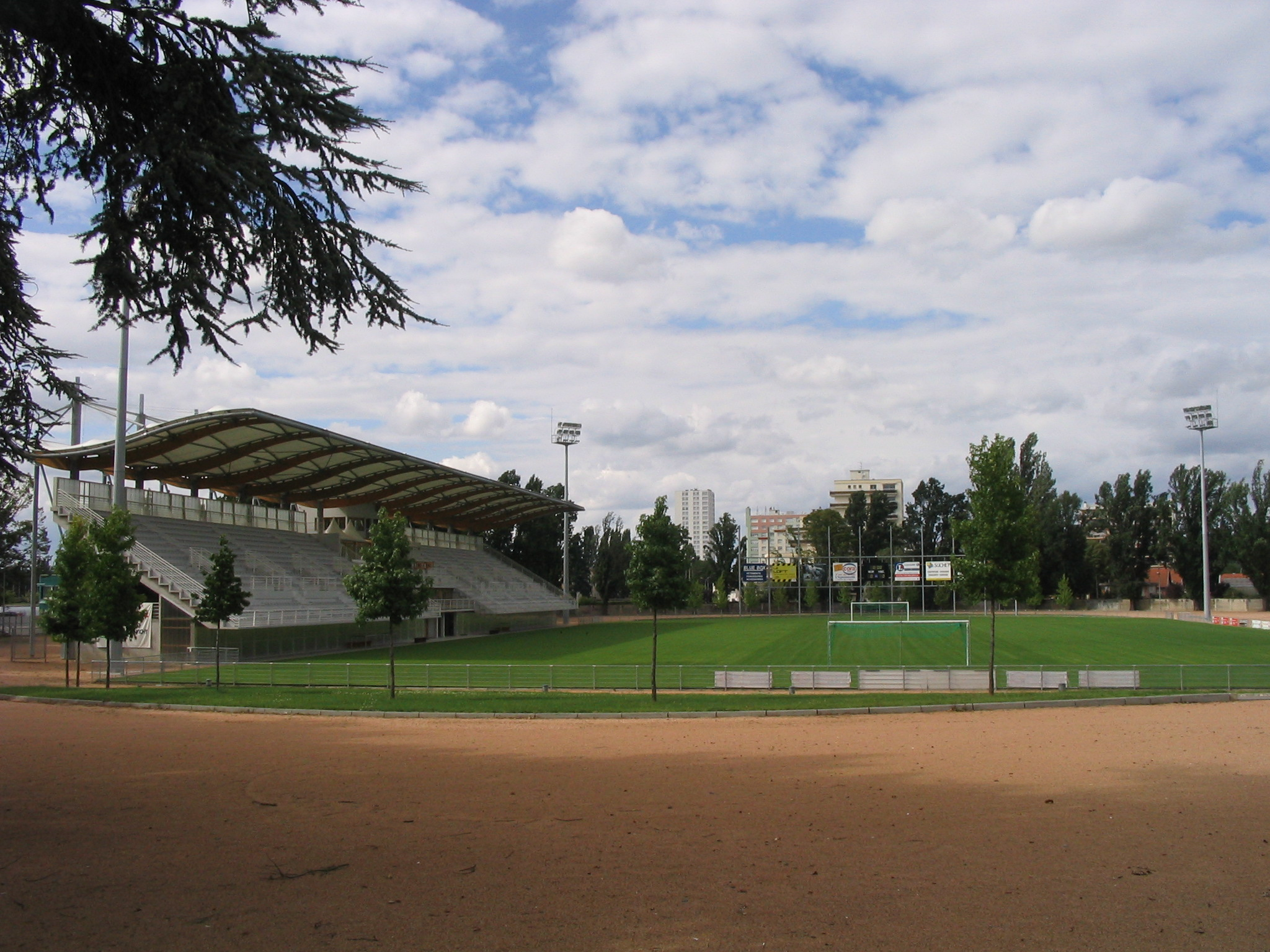 Stade Darragon à Vichy. Author:Tej.